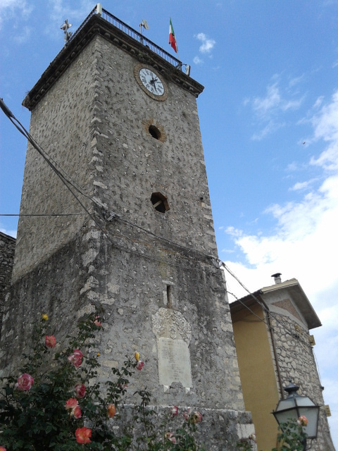 Torre dell'orologio